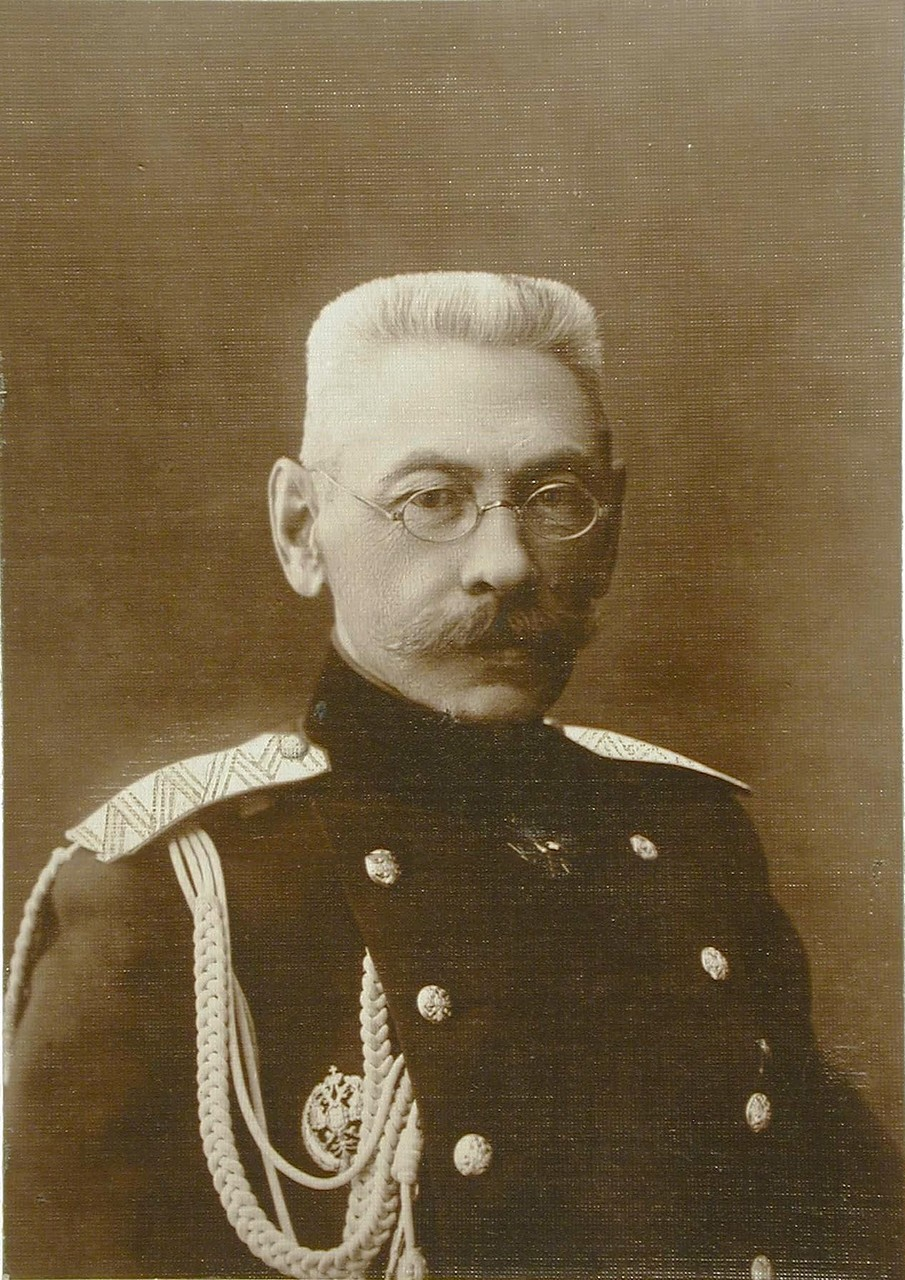 Рузский Николай Владимирович